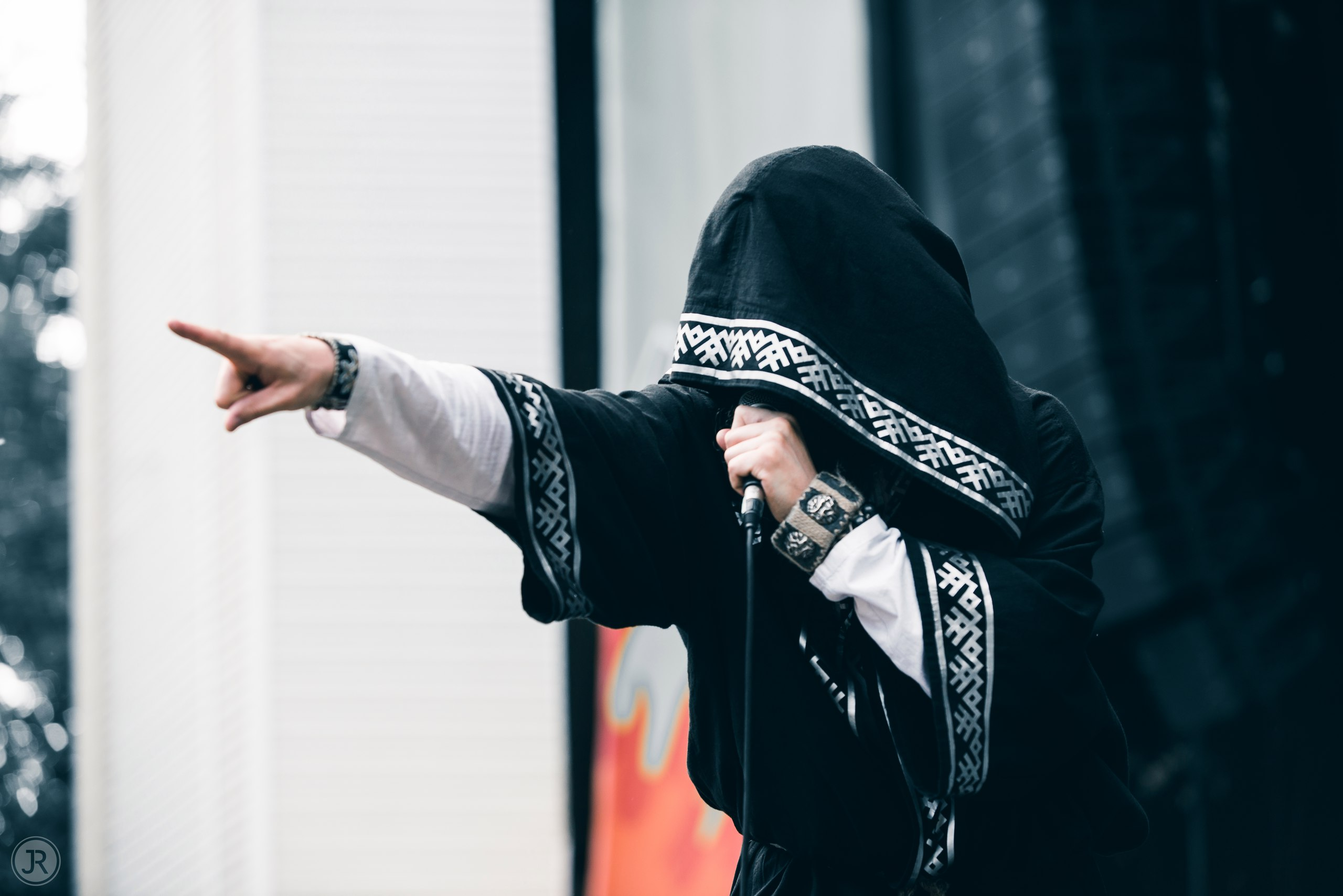 Нейромонах Феофан на фестивале ANABUK в 2016 году.